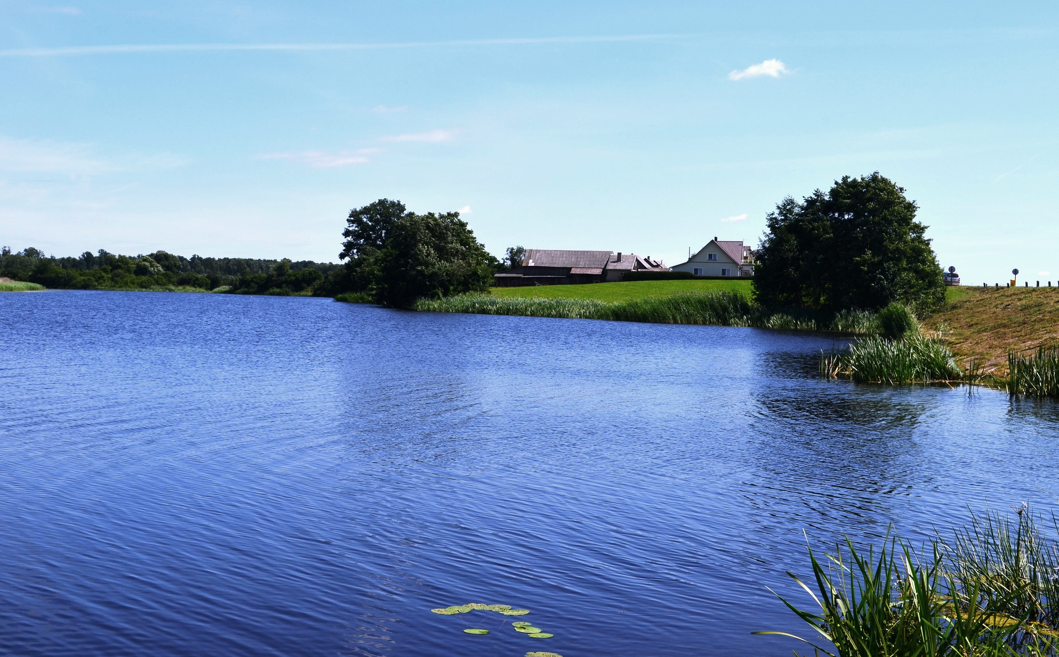 Pamėkliai ir Labūnavos tvenkinys nuo Labūnavos pusės. Kėdainių raj.